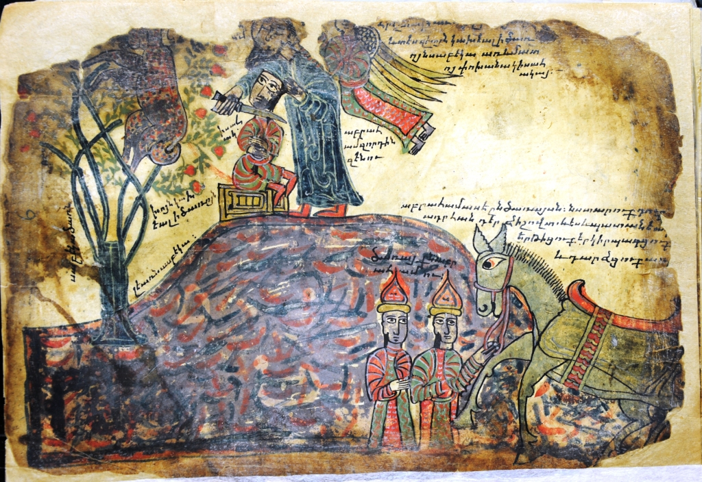 Առաքել Գեղամեցի